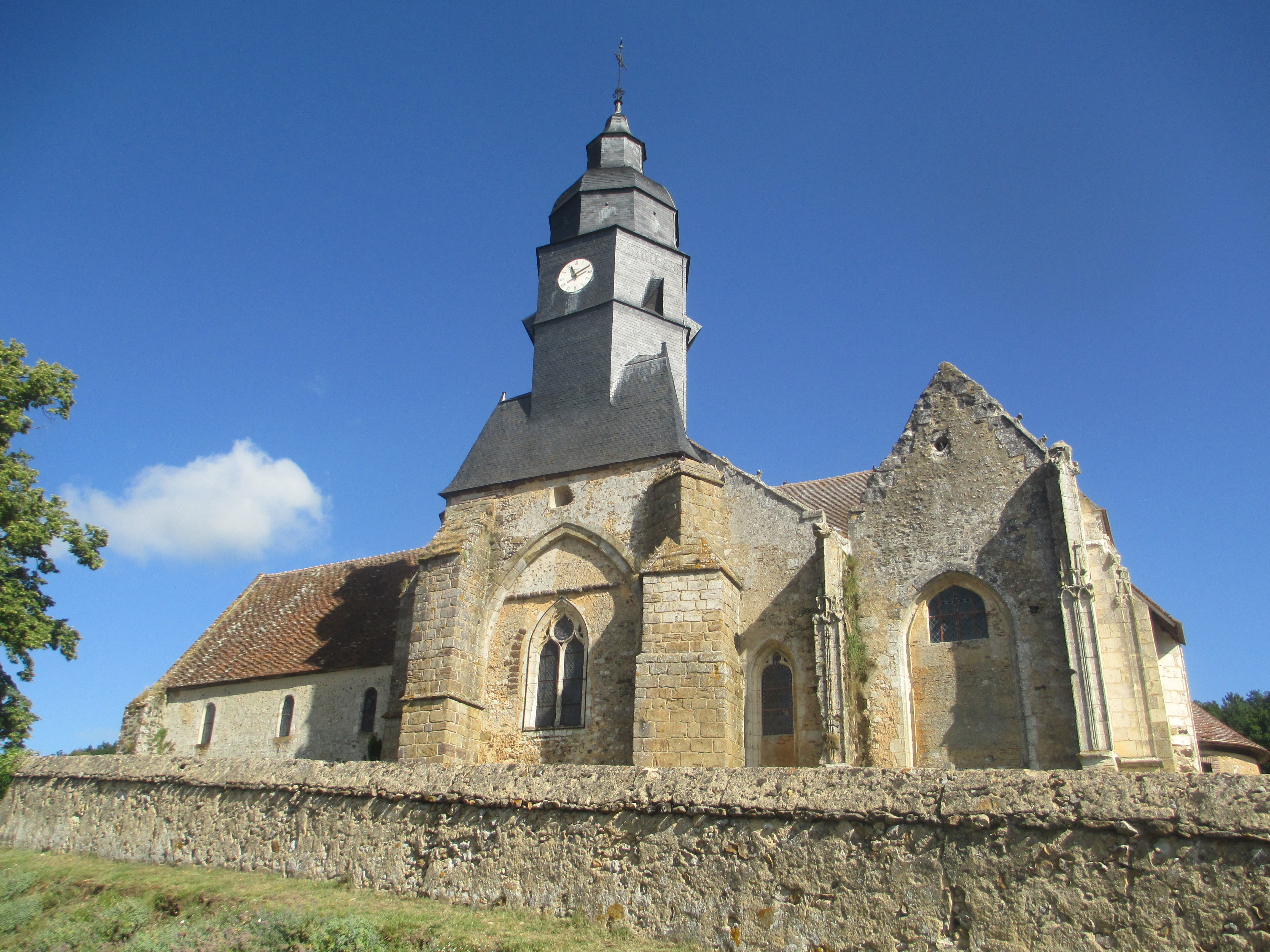 Église Notre-Dame du Mont-Harou à Moutiers-au-Perche. .